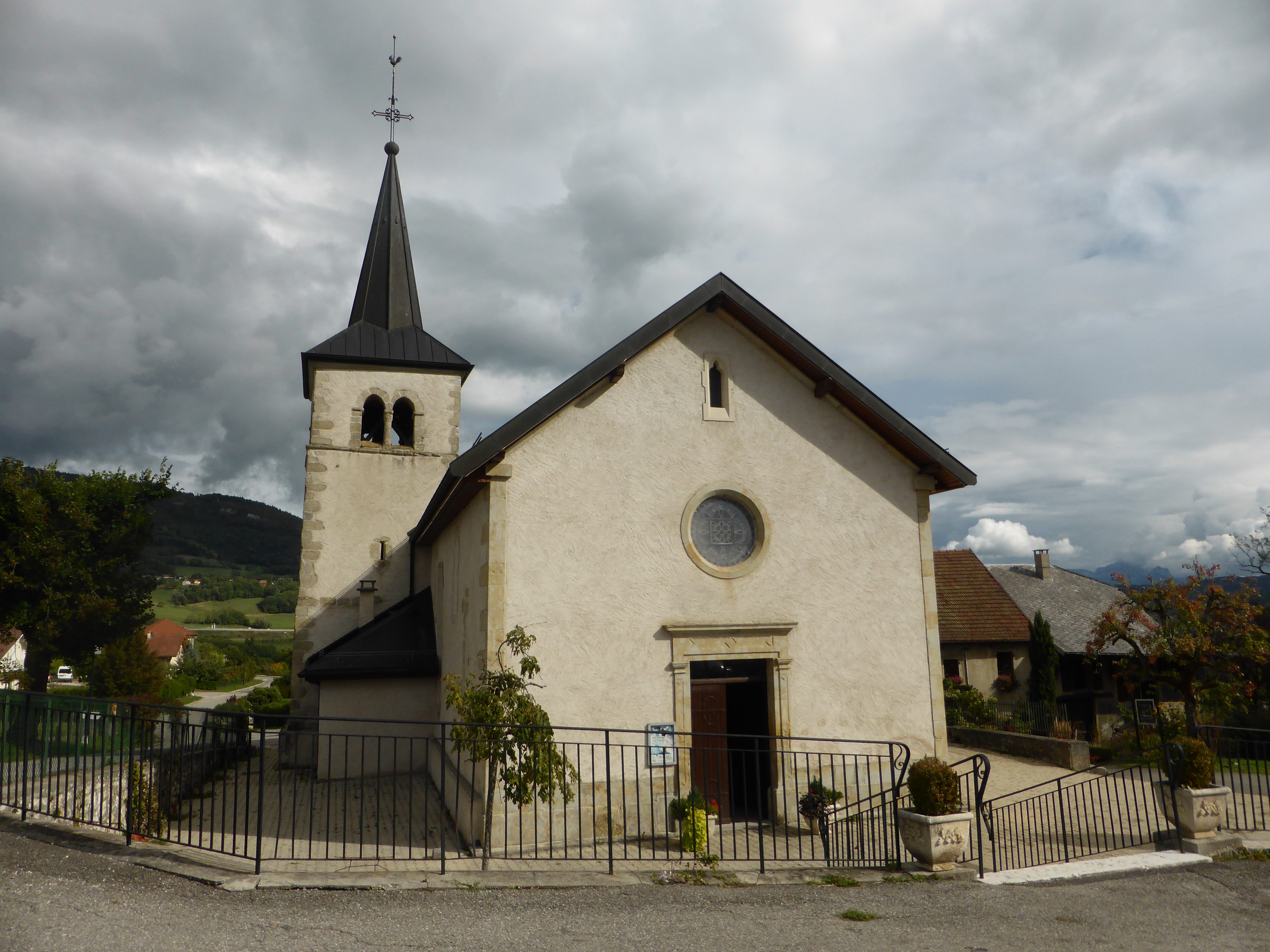 Église Saint-Barthélémy d'Andilly, en Haute-Savoie.